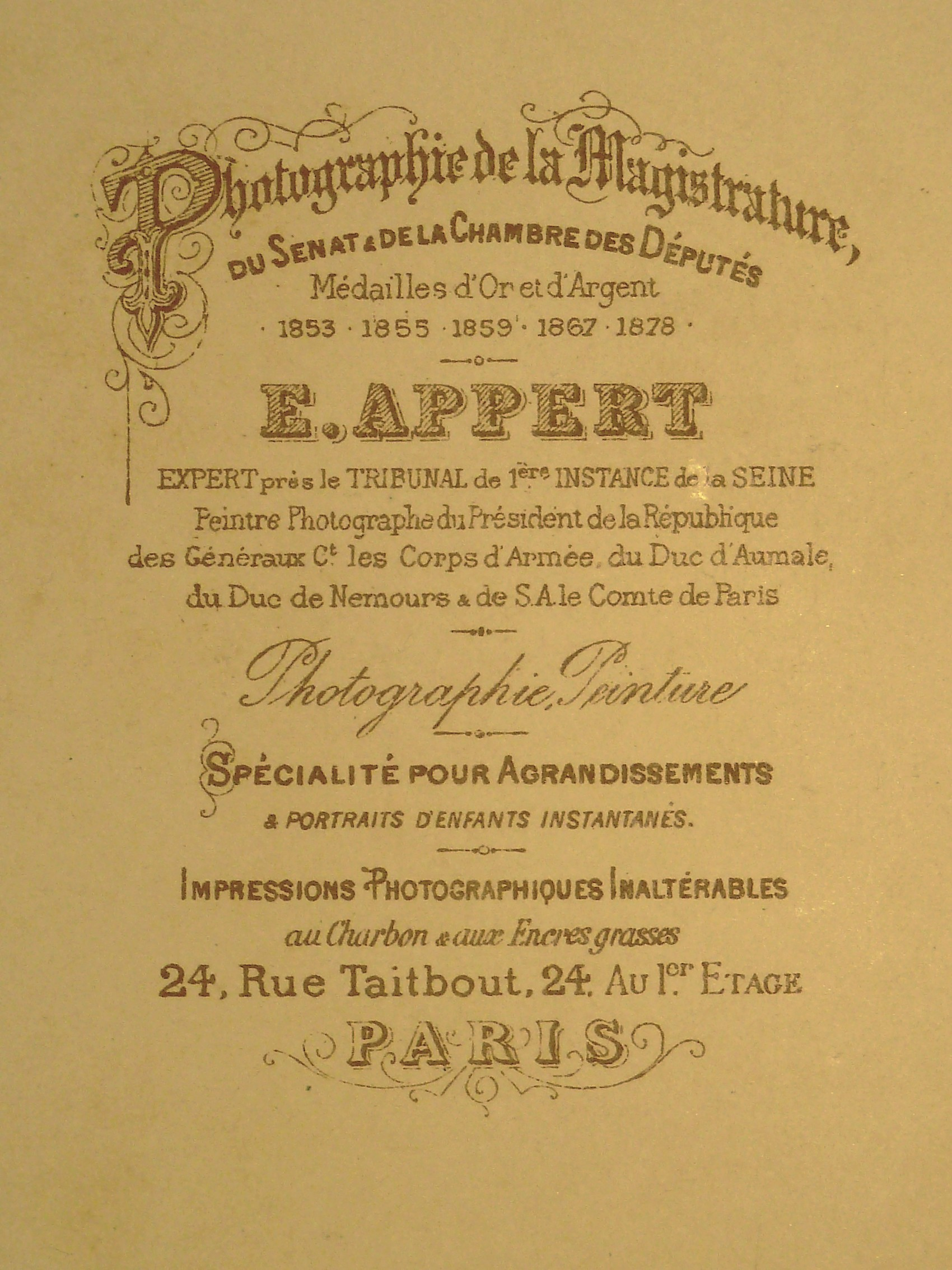 Dos des carton des photos d'Eugène Appert, vers 1880 (ici format Cabinet). Collection personnelle.